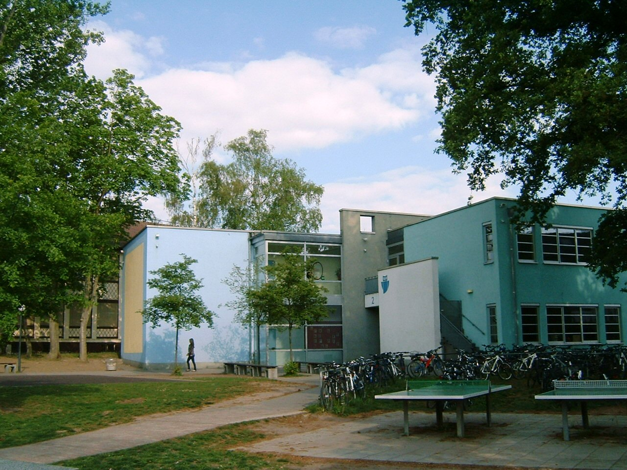 Anna-Schmidt-Schule, Schulgebäude, Frankfurt Nieder Erlenbach